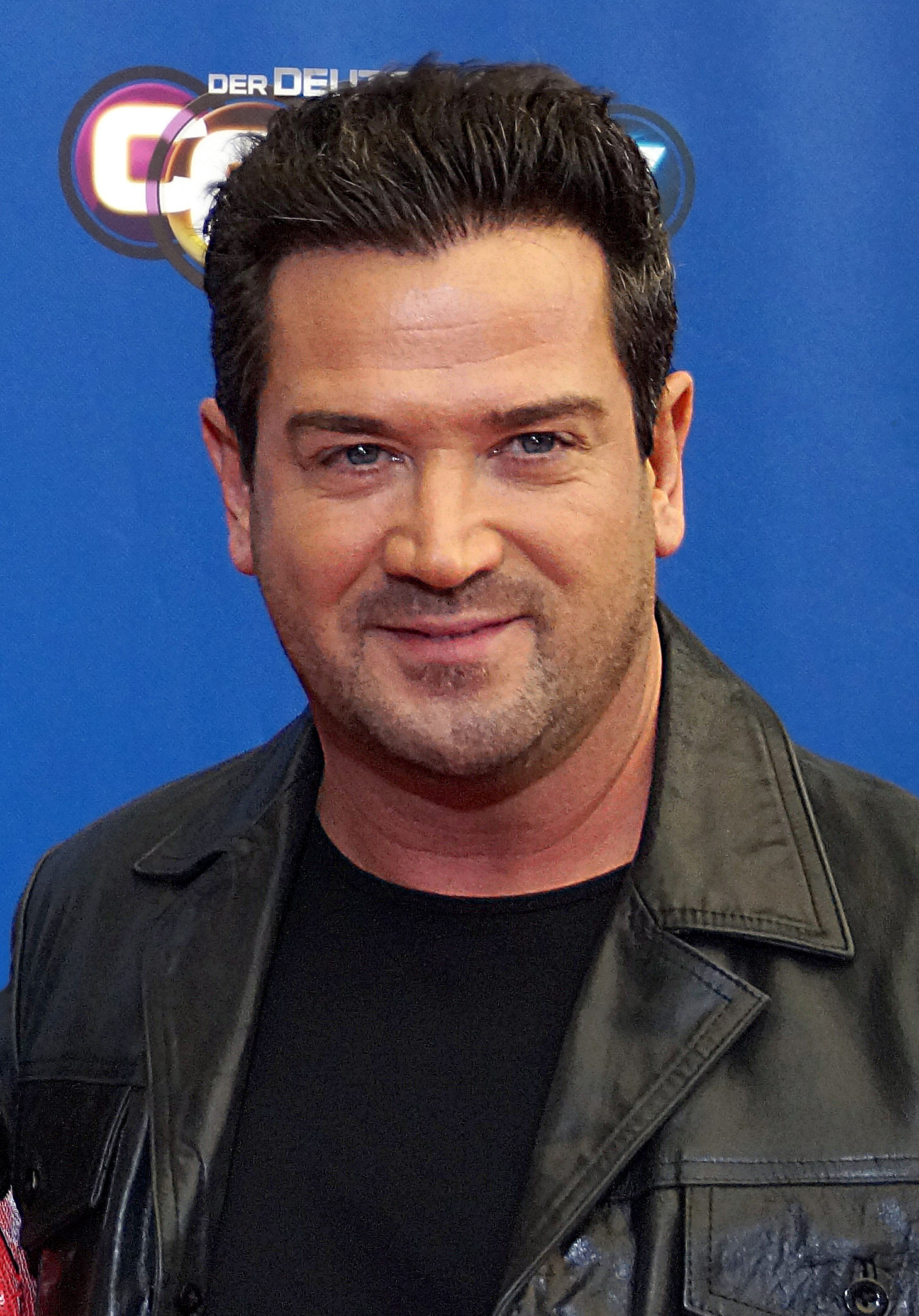 Sam Eisenstein beim Comedypreis 2016, im Oktober 2016, Köln.